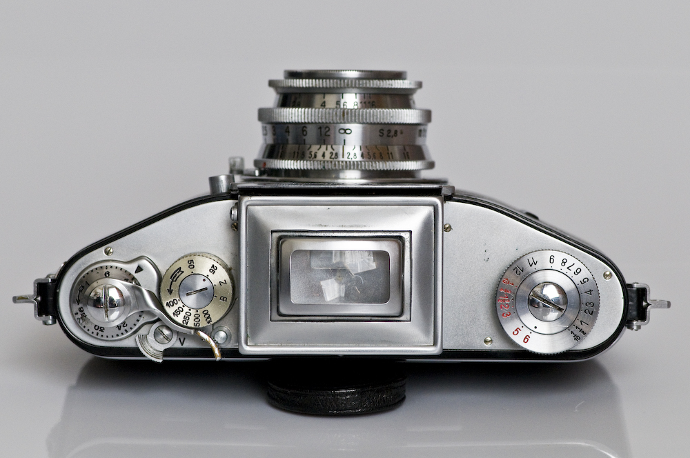 Ihagee Kine Exakta Typ 3 Deckkappe mit Bedienelementen